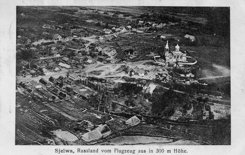 Беларуская (тарашкевіца): Зэльва (Zelva). Аэрафотаздымак